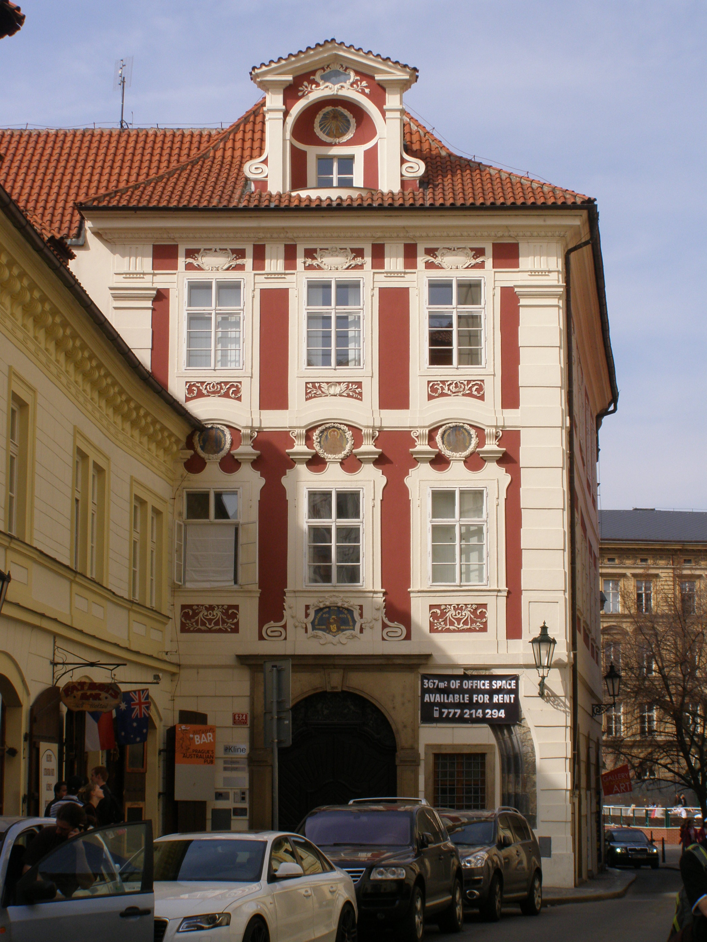 Praha, Staré Město, ulice Malá Štupartská